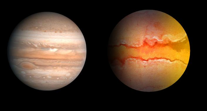 Comparación de tamaños entre el exoplaneta WASP-2b y Júpiter. relative sizes of exoplanet WASP-2b and Jupiter